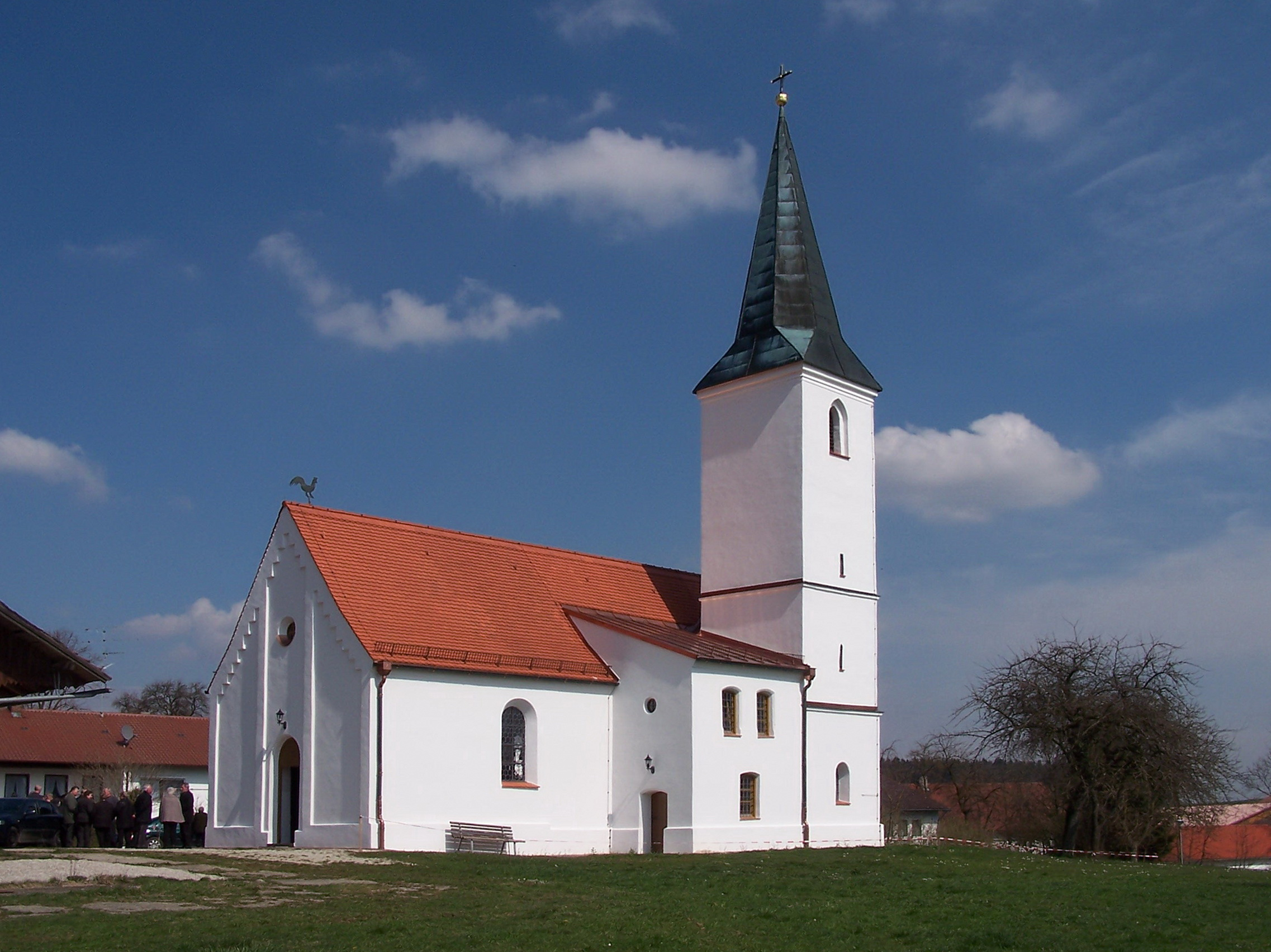 Stollnried, Kirchstraße 5. Filialkirche Mariä Himmelfahrt, frühgotisch, 13./14. Jh.; mit Ausstattung.